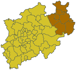 Regierungsbezirk Detmold, Lage in Nordrhein-Westfalen